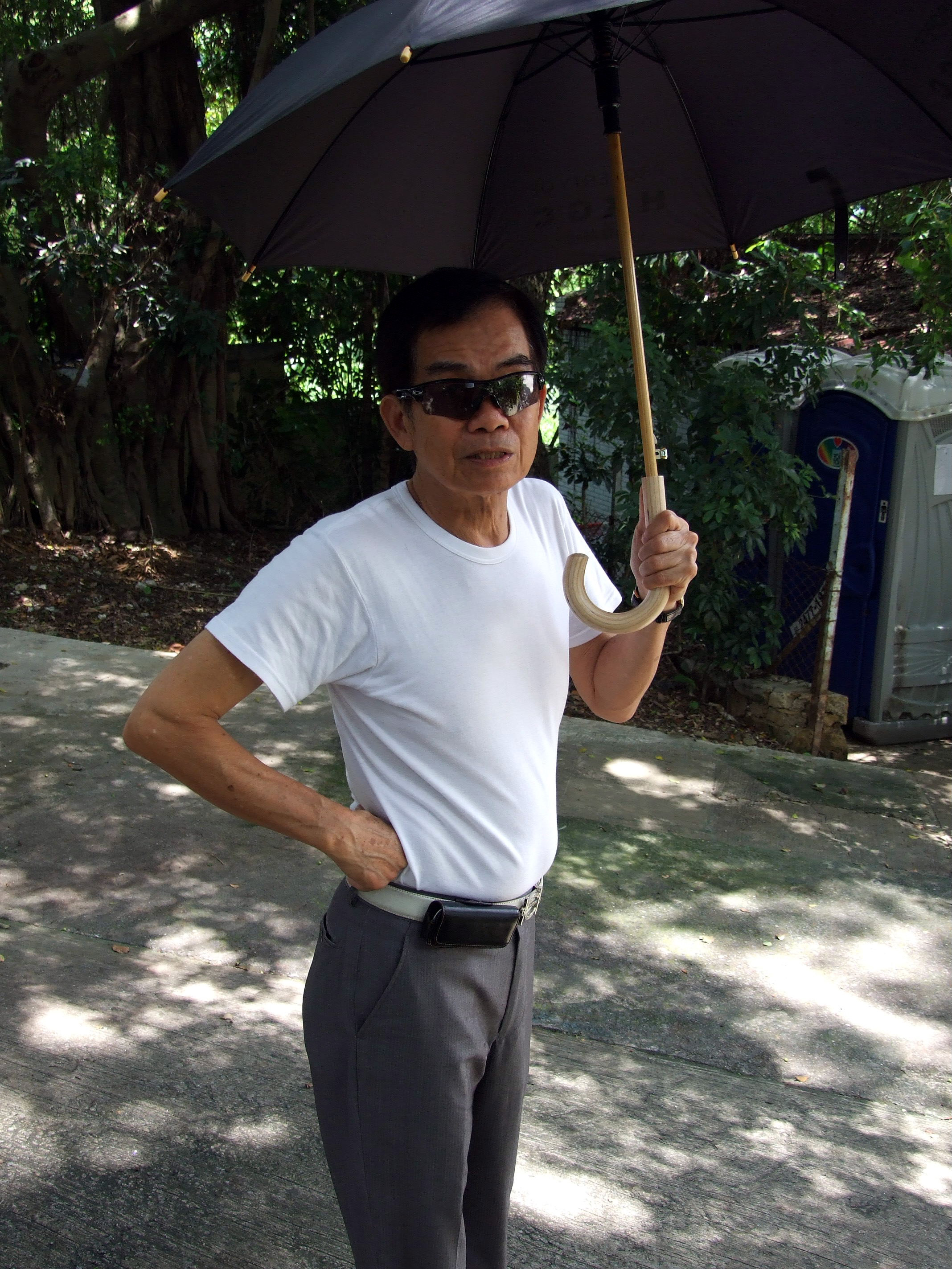 中文（香港）: 簡炳墀攝於松柏塱家居前